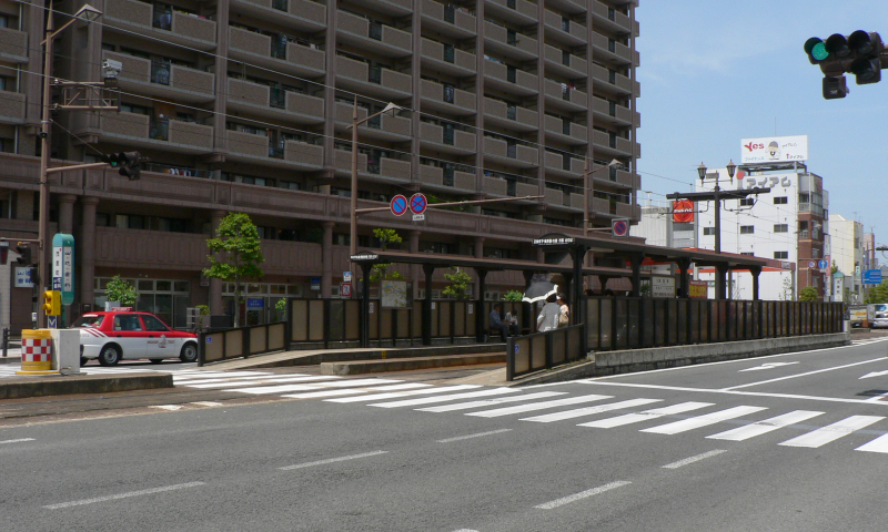 長崎電気軌道、茂里町電停